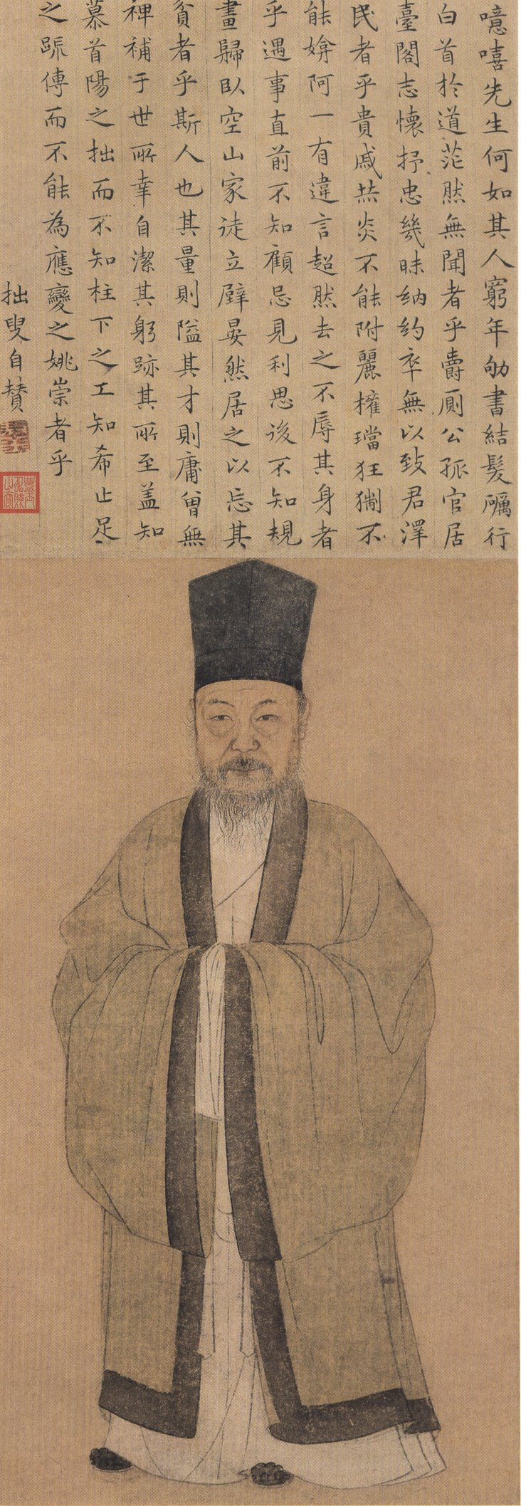 中文（香港）: 明代寫實容像